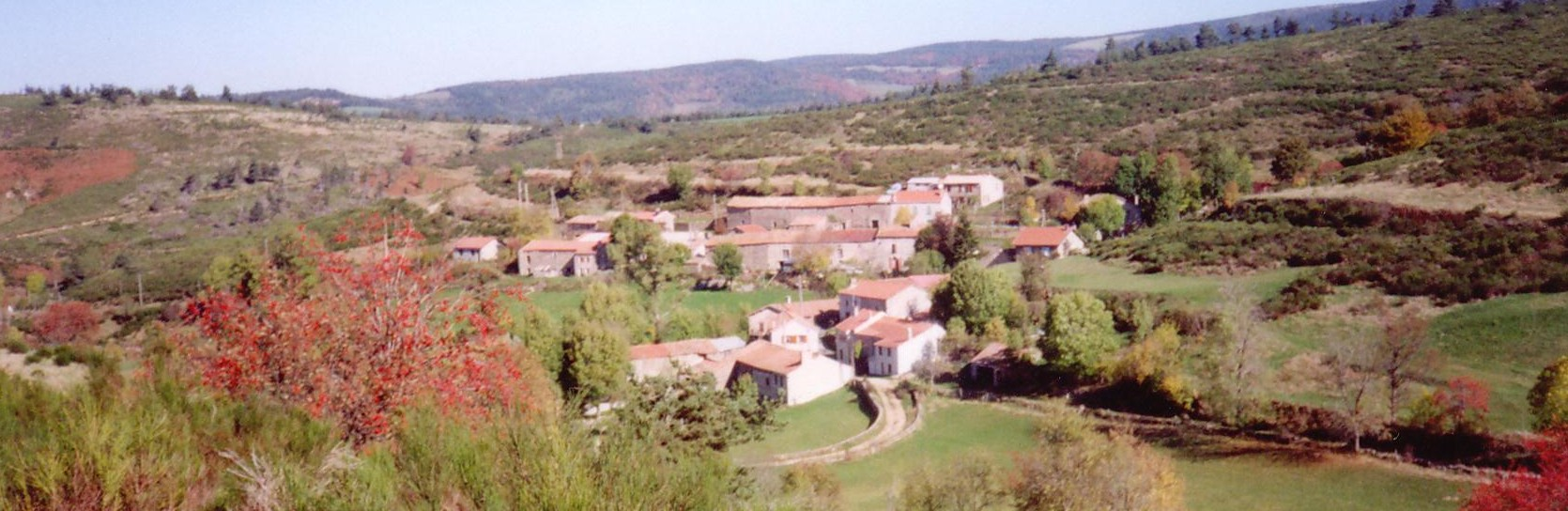 Les Hubacs, 07590, Ardèche, FRANCE